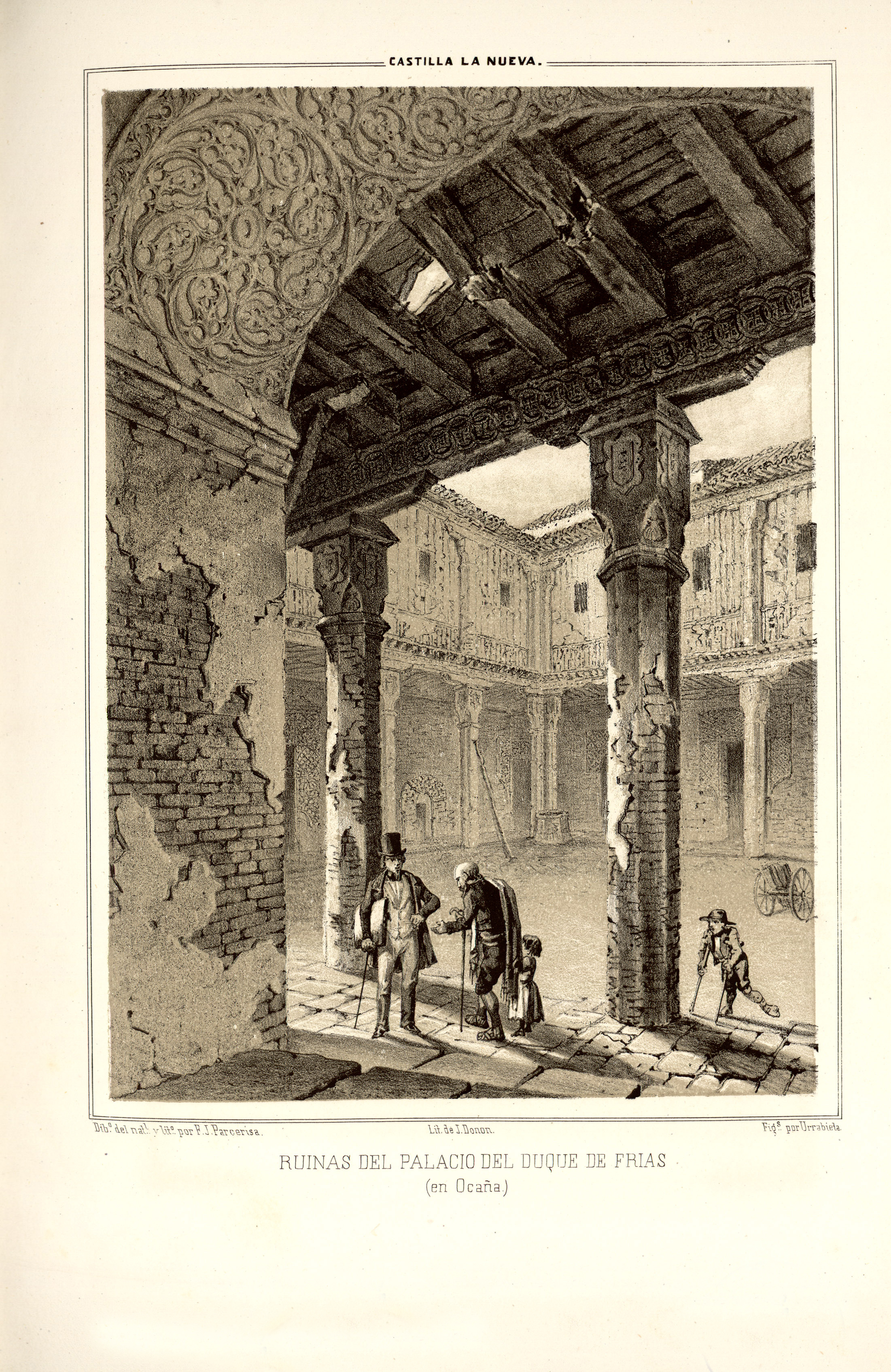 Ruinas del palacio del Duque de Frías (Ocaña).